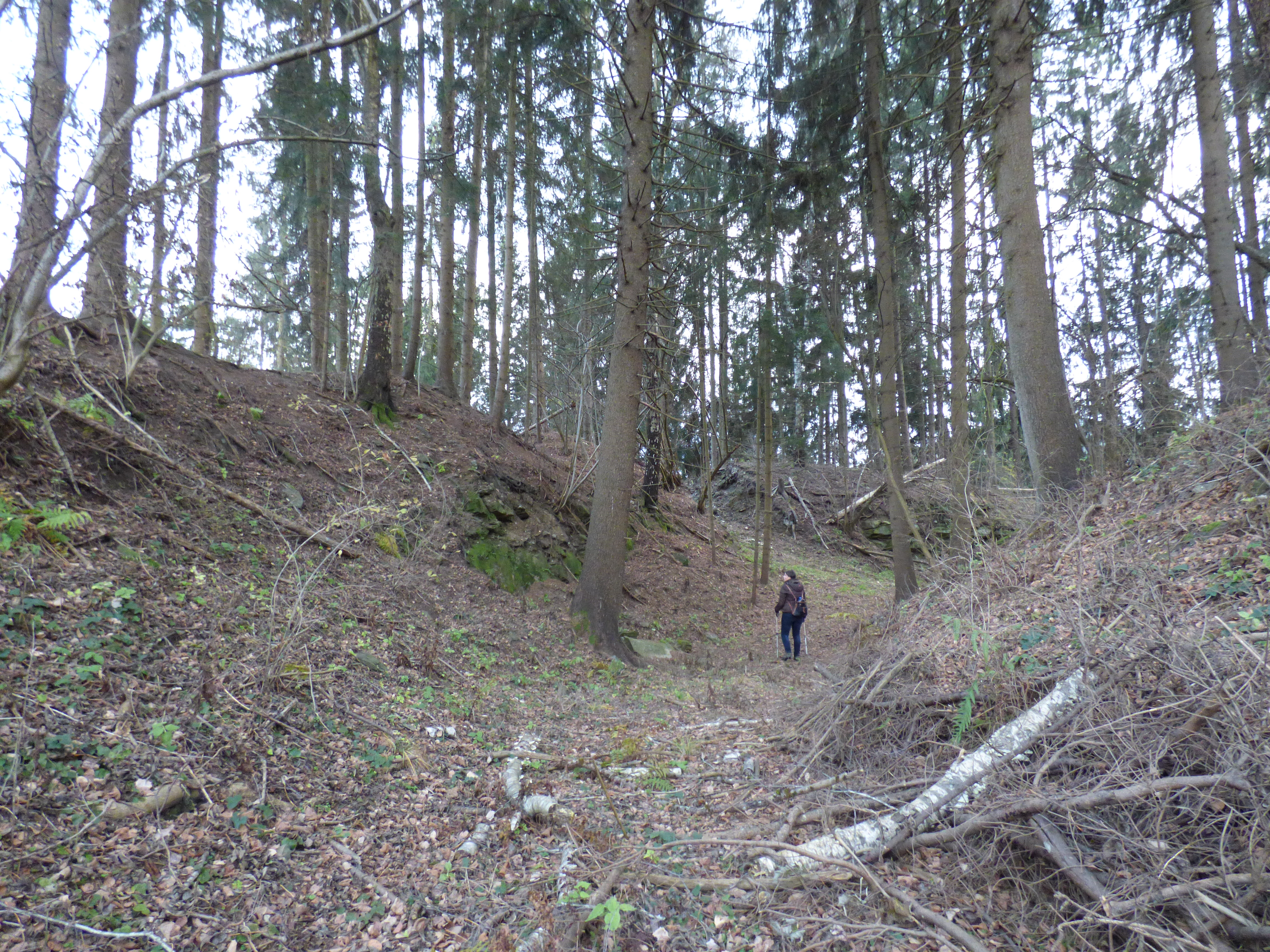 Burgruine Pöckstein (auch: Böckstein), Gemeinde Althofen, Kärnten. im Burggraben, nordöstlich der Burg